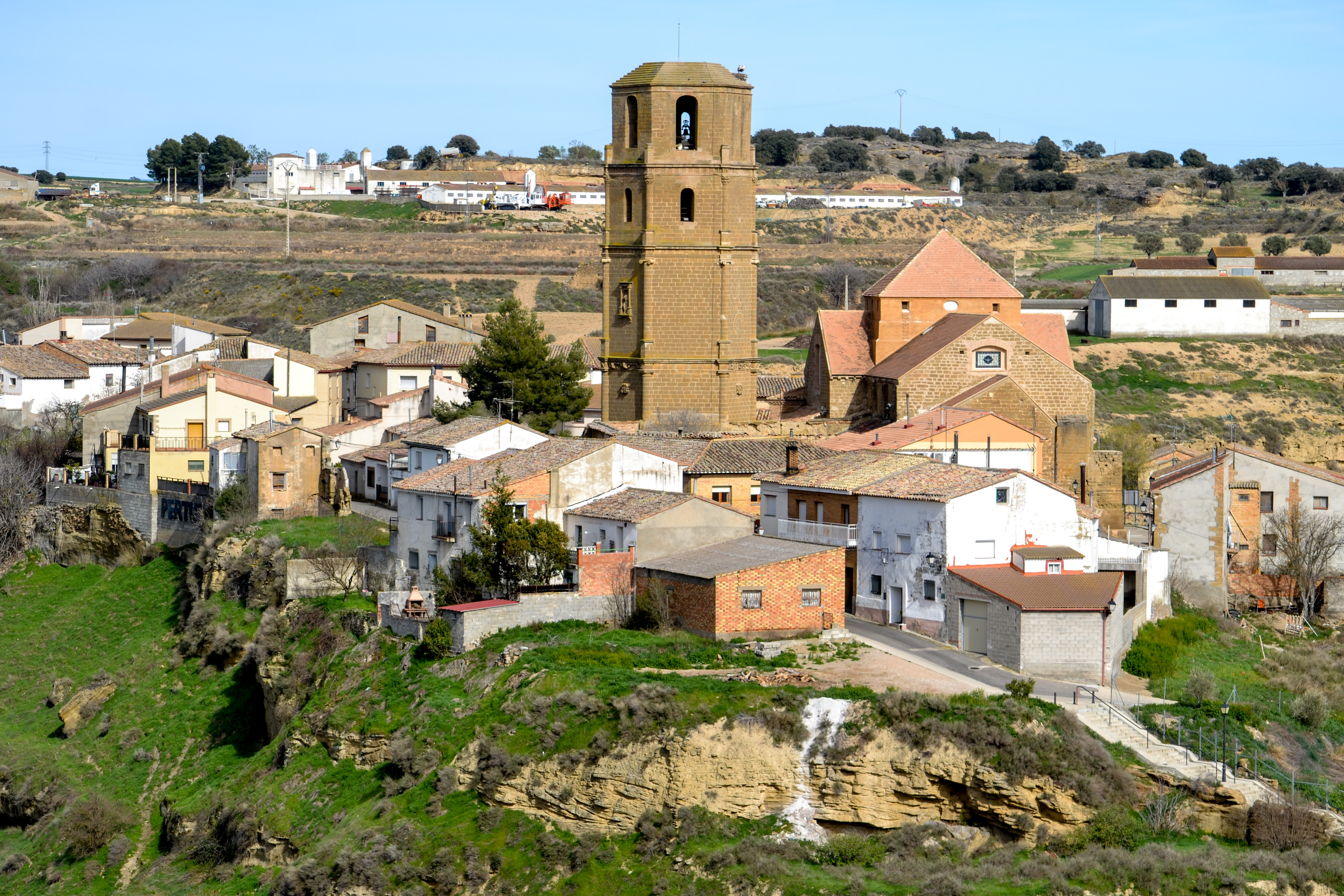 Vista de la población oscense de Pertusa, con la iglesia parroquial y la torre Torre Claustro Cripta e Iglesia